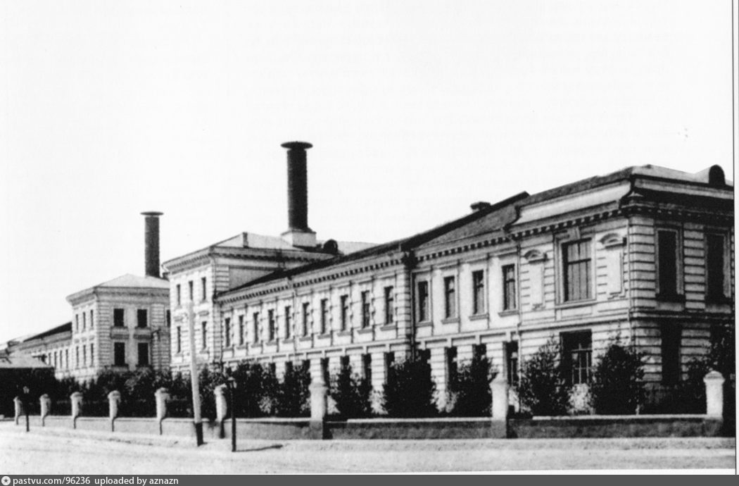 Здание факультетской клиники Московского университета на Девичьем поле, построенное в 1890 году.